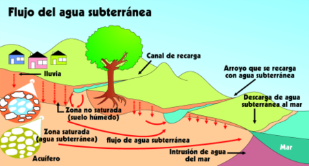 Original en